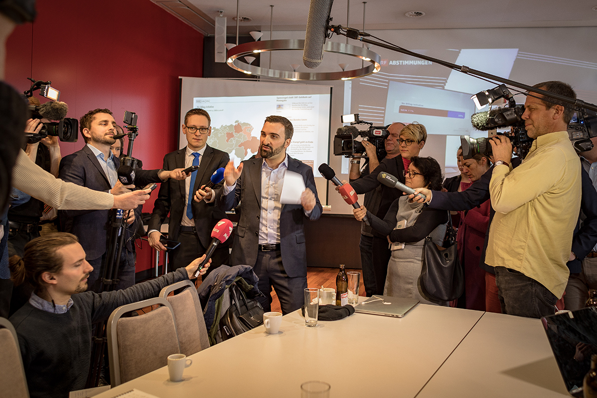 Olivier Kessler, Co-Präsident des Initiativkomitees No Billag und Vizedirektor des Liberalen Instituts, hält eine Rede nach der Abstimmungsniederlage